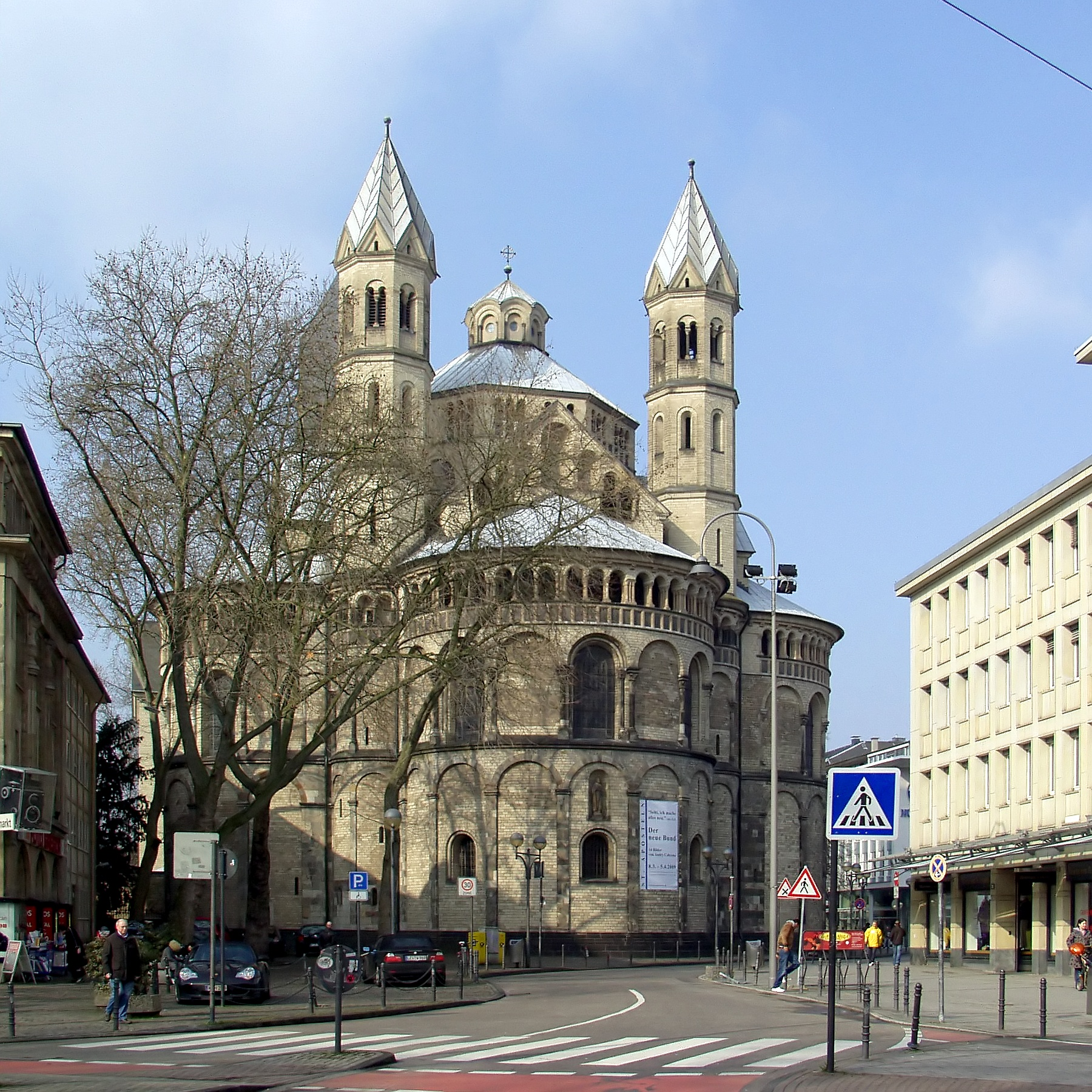 St. Aposteln Köln - Ostseite This is a photograph of an architectural monument.